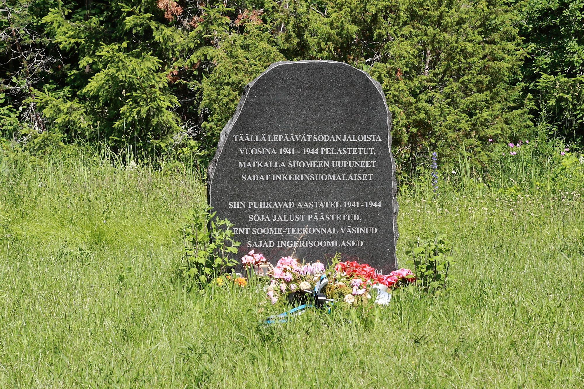 Põllküla terroriohvrite matmispaik